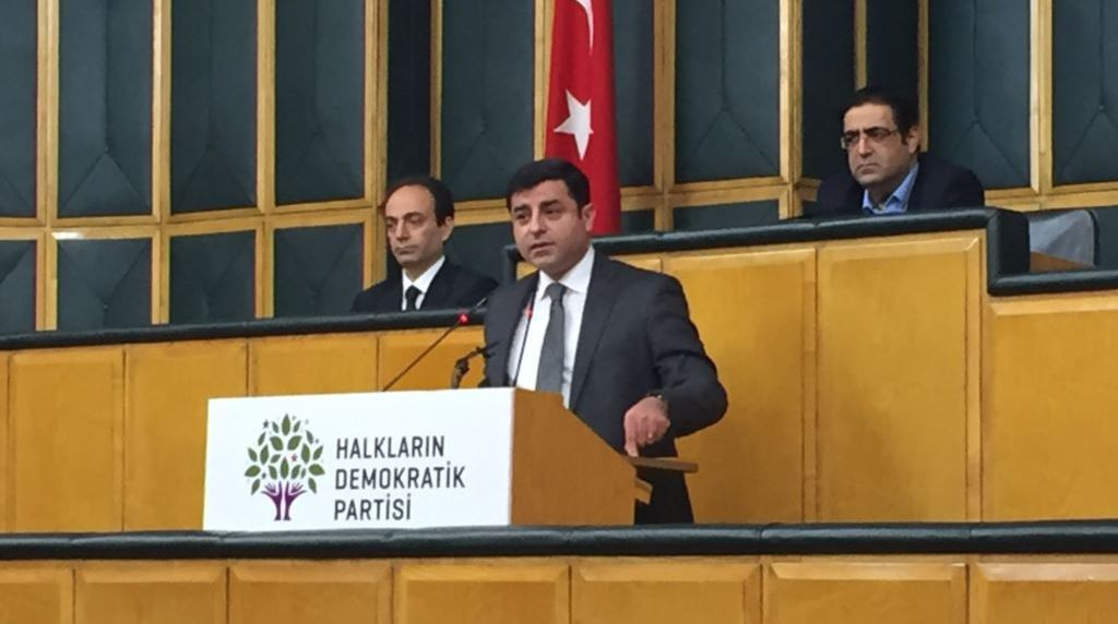 HDP grup toplantısı, 2 Şubat 2016